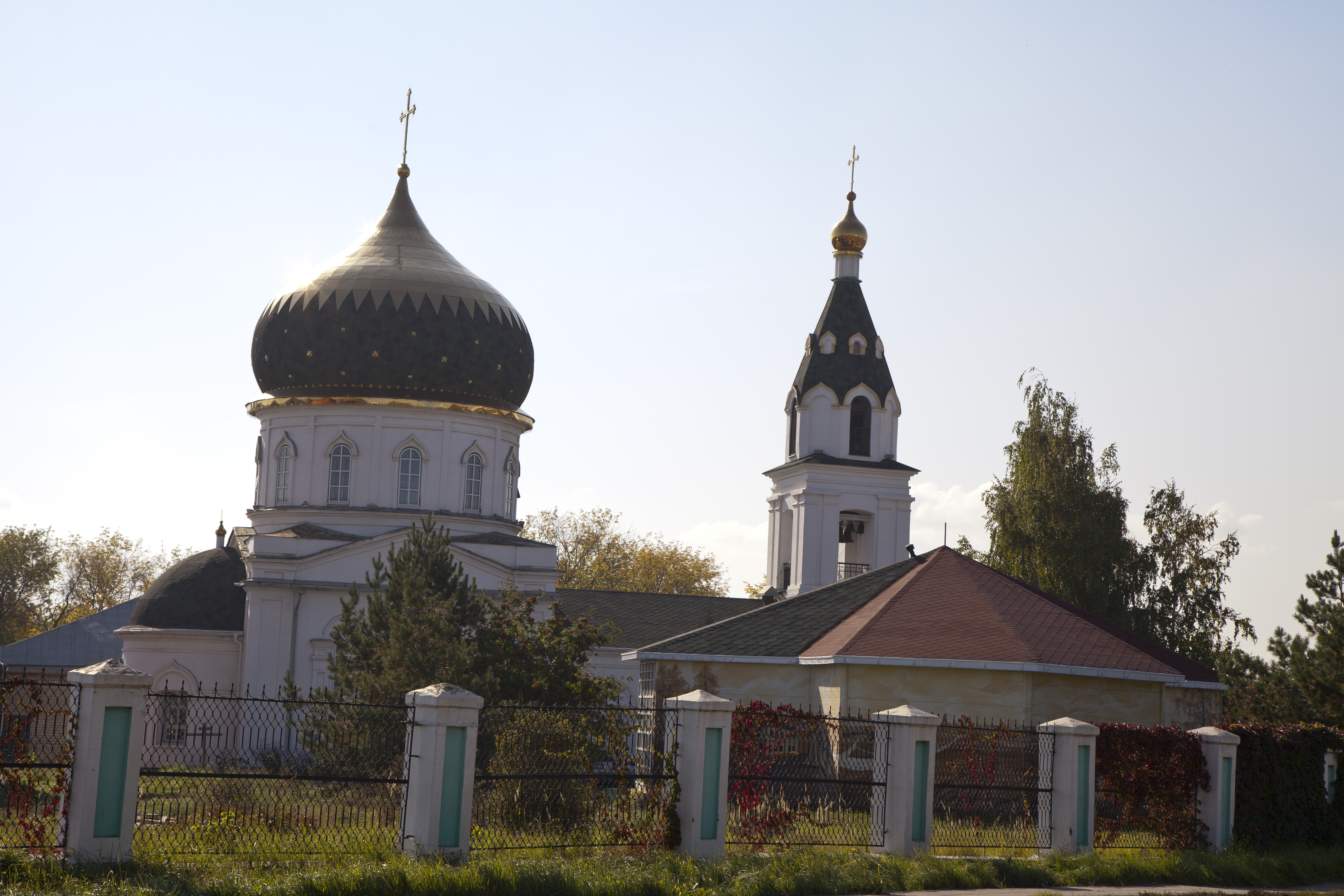 Вид храма сбоку